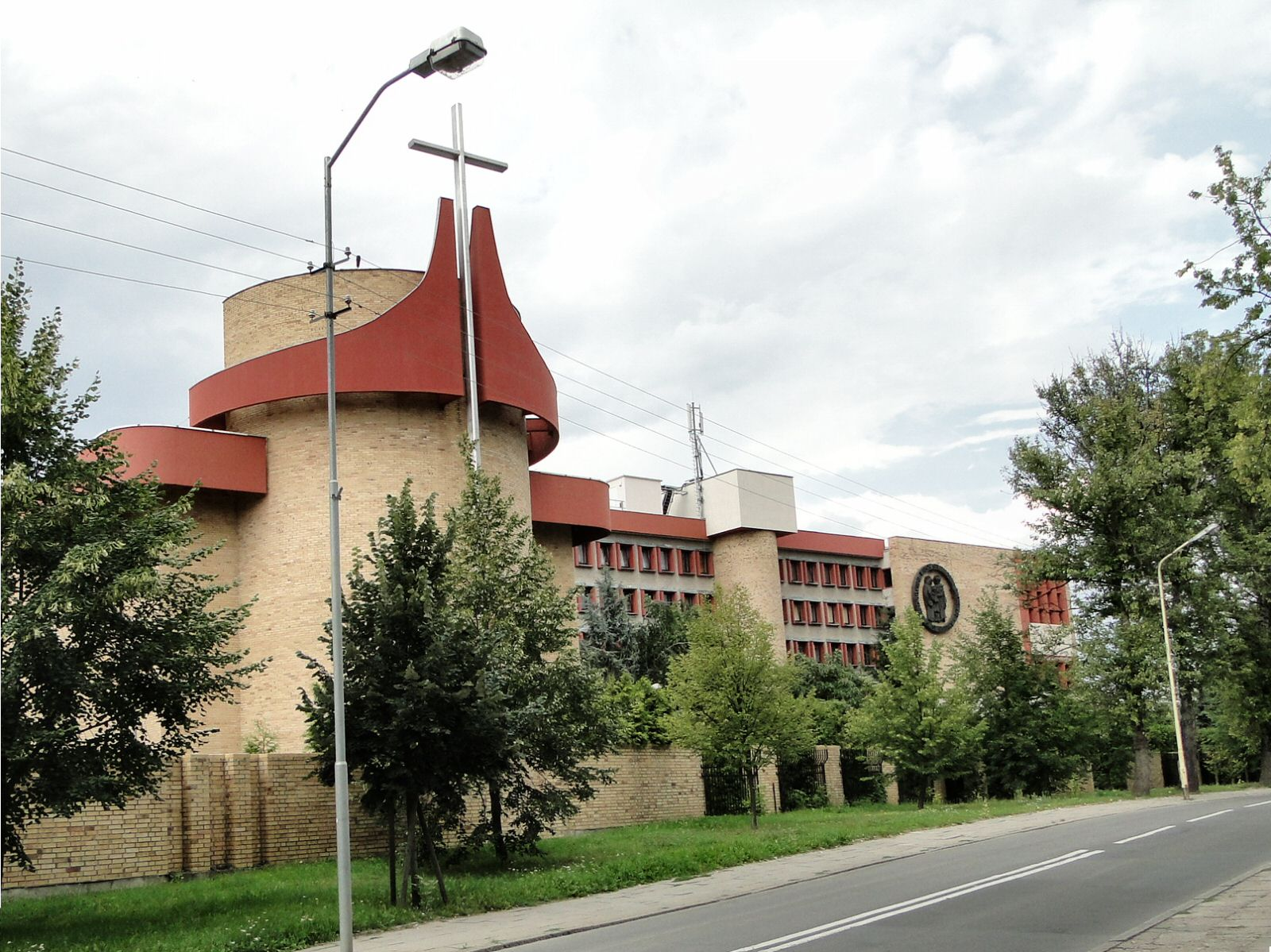 Siedziba Wydziału Teologicznego Uniwersytetu Szczecińskiego przy ulicy Papieża Pawła VI nr 2 w Szczecinie.